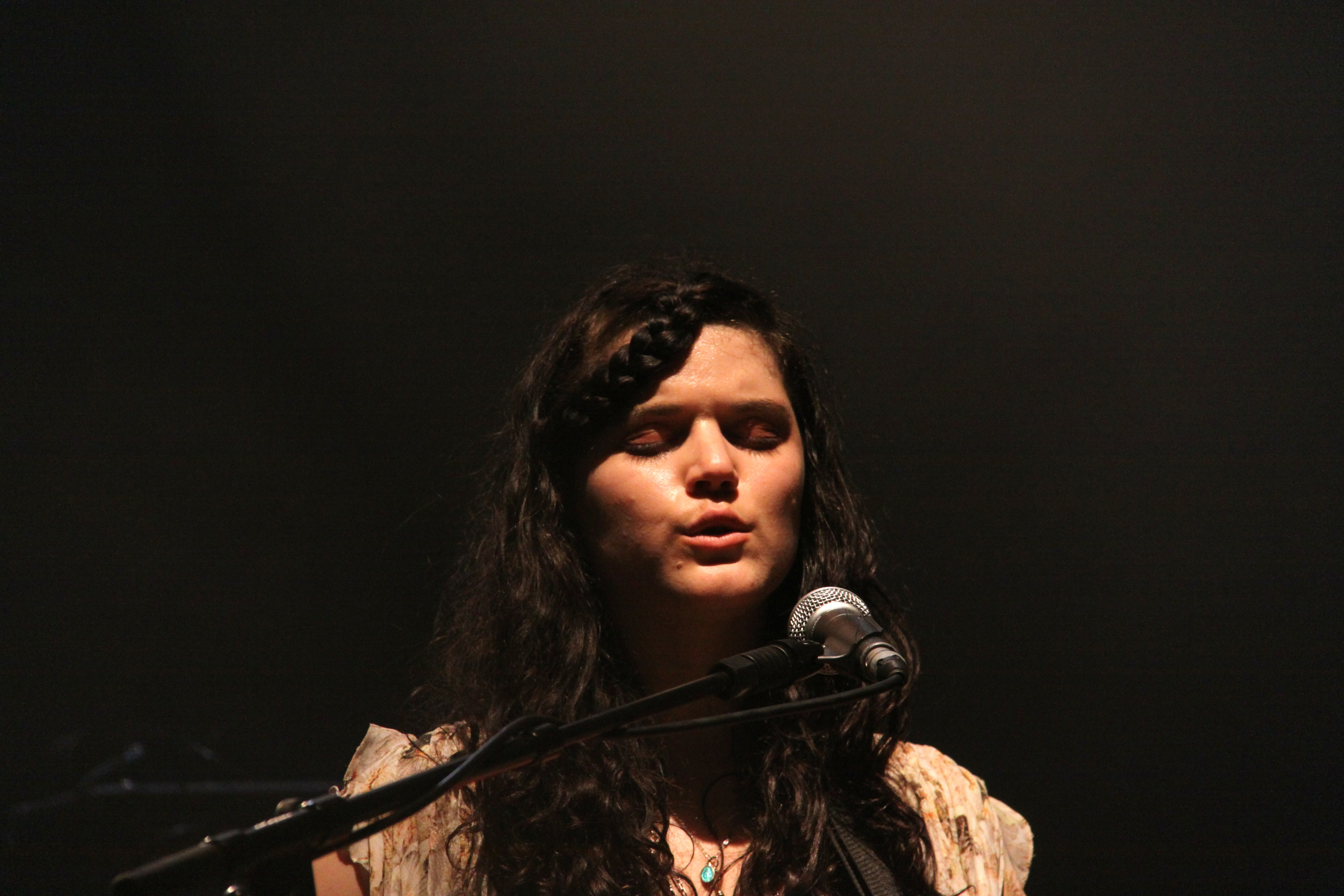 La chanteuse Soko (Stéphanie Sokolinski) lors de ses premières Francofolies en juillet 2012. « Premières Francos » au théatre Verdière de La Coursive. Francofolies de La Rochelle 2012 (11 au 15 juillet). La Rochelle, Charente Maritime, France.